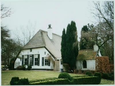 Rijksmonument "De Jonge Stee" aan de Plaggeweg 26 te Vierhouten. Dateert van vermoedelijk voor 1650, werd in 1819 verbouwd.